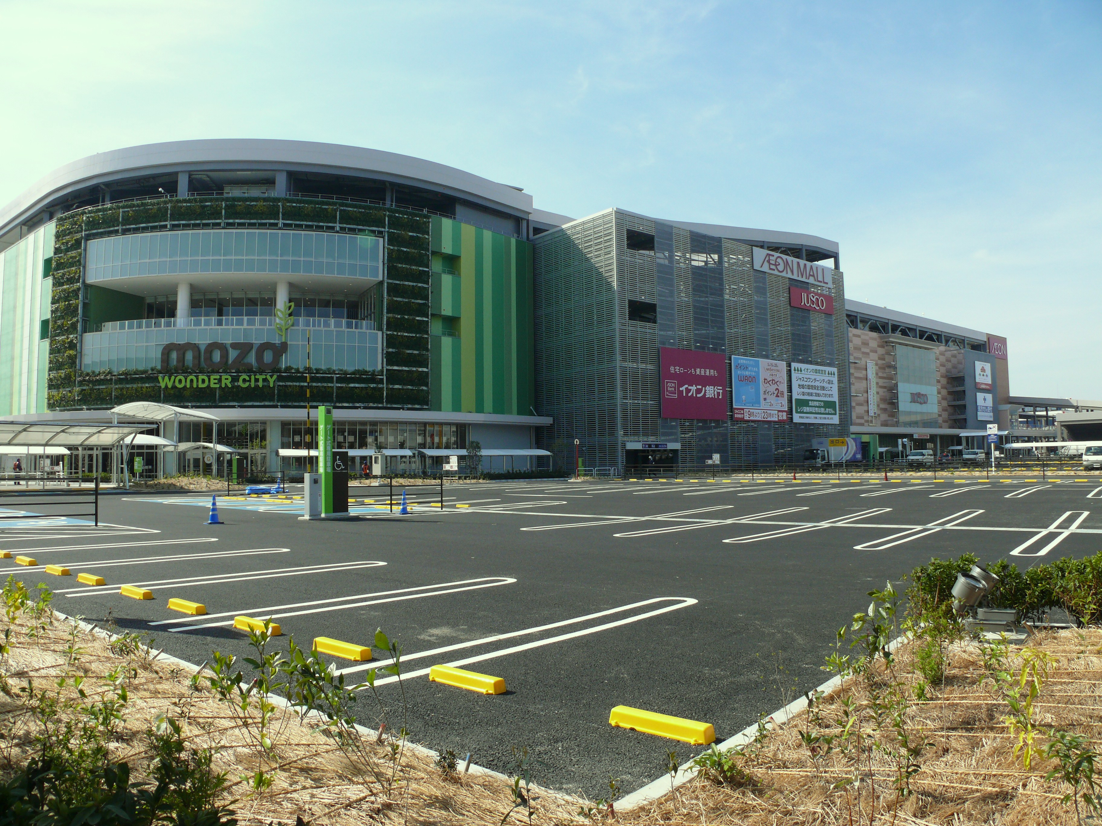 イオングループのショッピングセンター「MOZO（モゾ）ワンダーシティ（旧イオンモール名古屋ワンダーシティ」